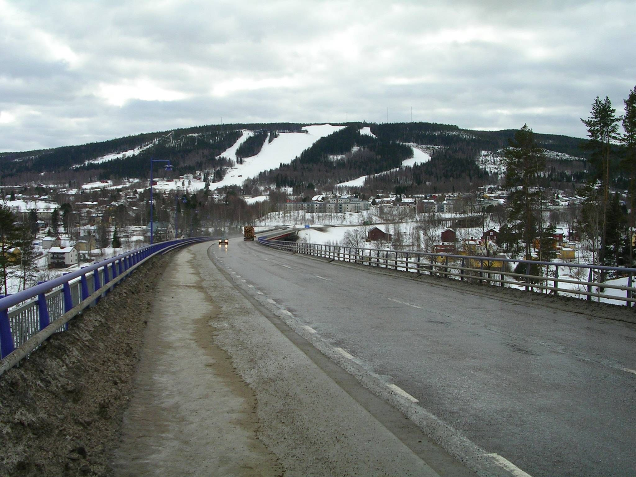 en bild av sollefteå i norra sverige